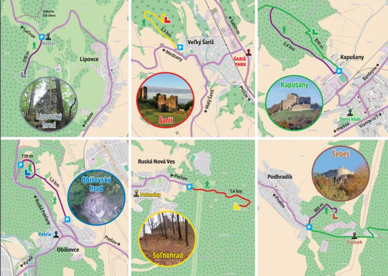 Prešovská hradná cesta. Verejný profilový pútač, k propagácii cestovného ruchu v okolí mesta Prešov. Slávnostná inštalácia 15.3.2016. Detail Hlavná ulica, mesto Prešov.Slovensko.